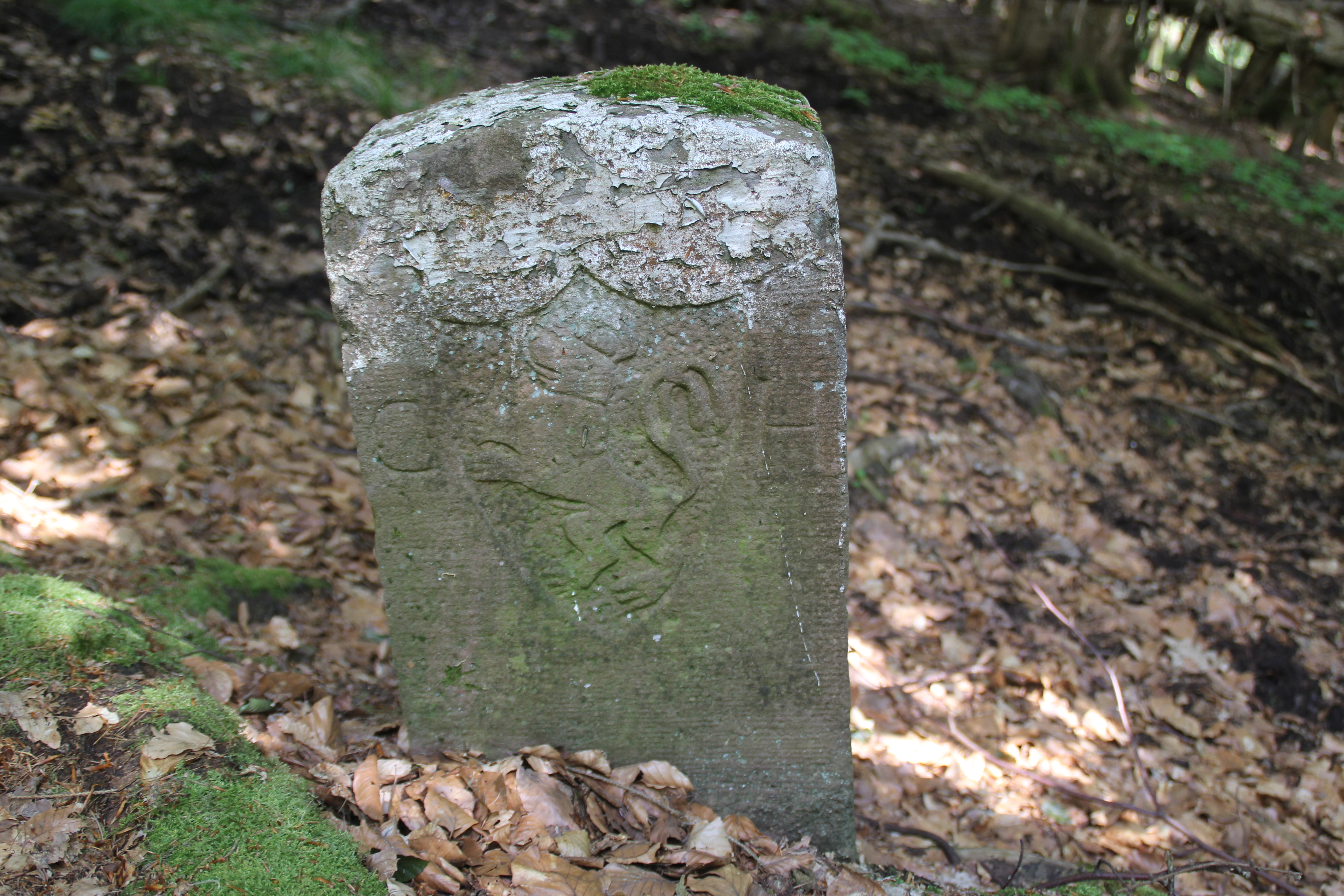 Grenzstein zwischen Geiselbacher Forst und Huckelheim